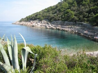 Javorna Bay on the Island of Losinj in Croatia / Uvala Javorna na otoku Losinju